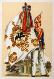 Fahne des Alexander Garde Grenadier Regiments Nr. 1